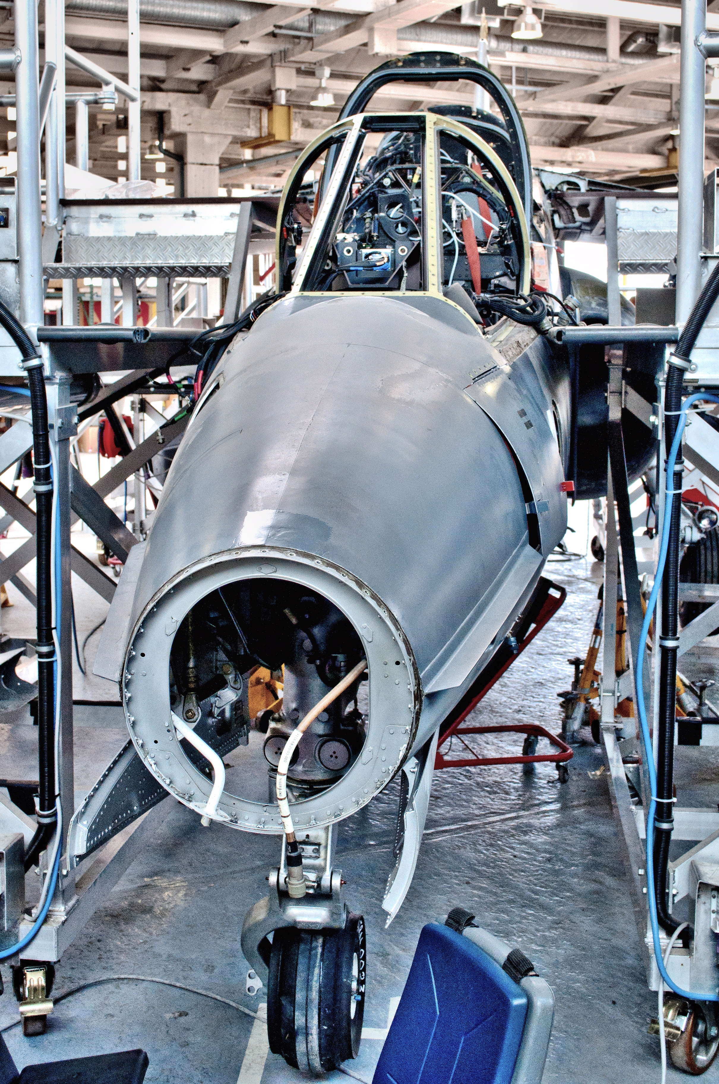 Alpha Jet Repair HDR